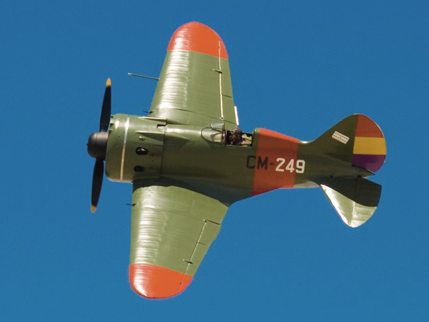 Polikarpov I-16 con los embleas y colores del Ejército popular Repúblicano de España, preservado por la fundación Infante de Orleans Canon EOS 400D + Sigma 70-300 @ 86mm f/8 1/500s ISO 100